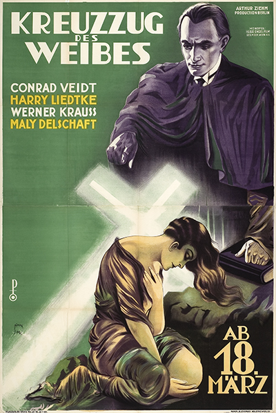 Plakat im Vielfarbdruck in den Maßen circa 188 x 126 cm, in zwei Teilen gedruckt durch die Papier- und Blechdruckindustrie in Wien, entworfen von dem Künstler Lipót Sátori im Atelier Georg Pollak im Jahr 1926 für den Film „Kreuzzug des Weibes“ der Arthur Ziehm Filmproduktion. Regie: Martin Berger, mit den Schauspielern Conrad Veidt, Werner Krauß, Maly Delschaft ...